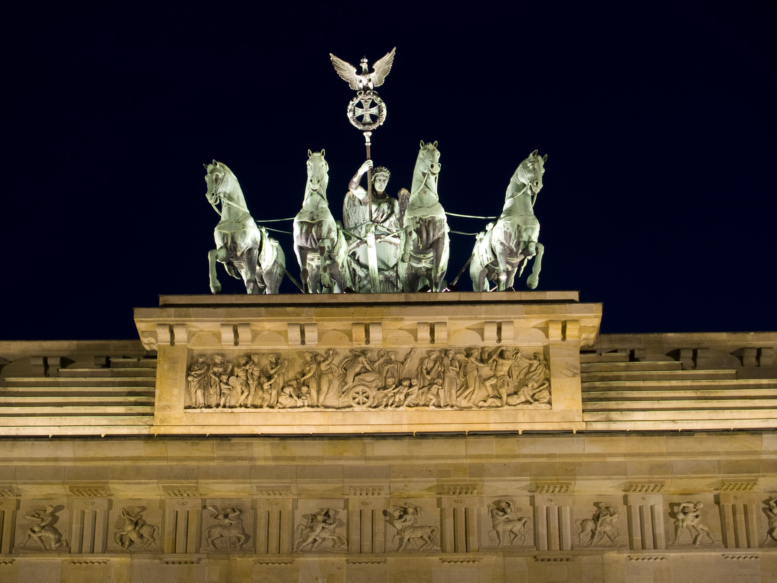 Quadriga, Brandenburger Tor bei Nacht